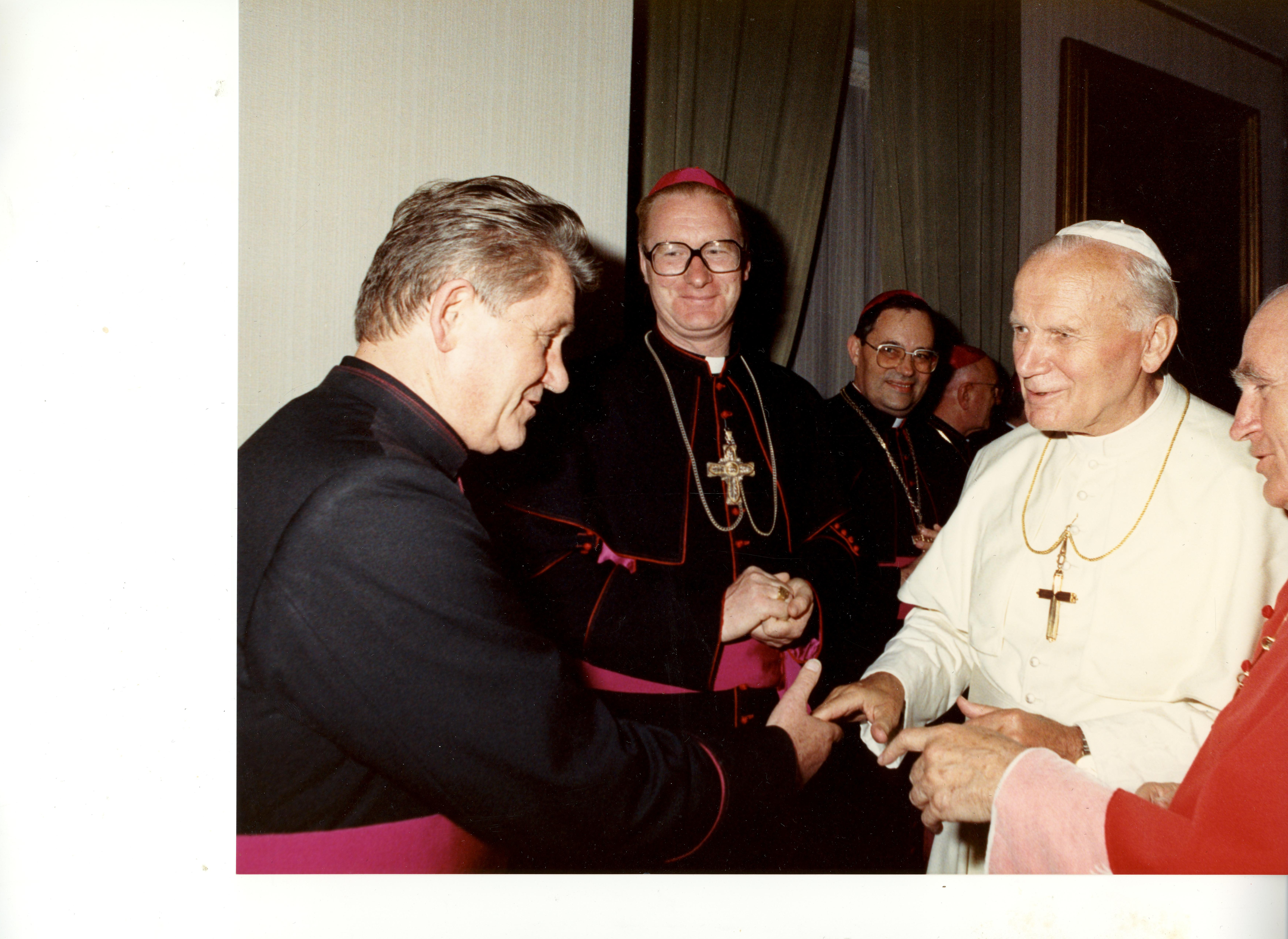 U posjeti Papi Ibanu-Pavlu II